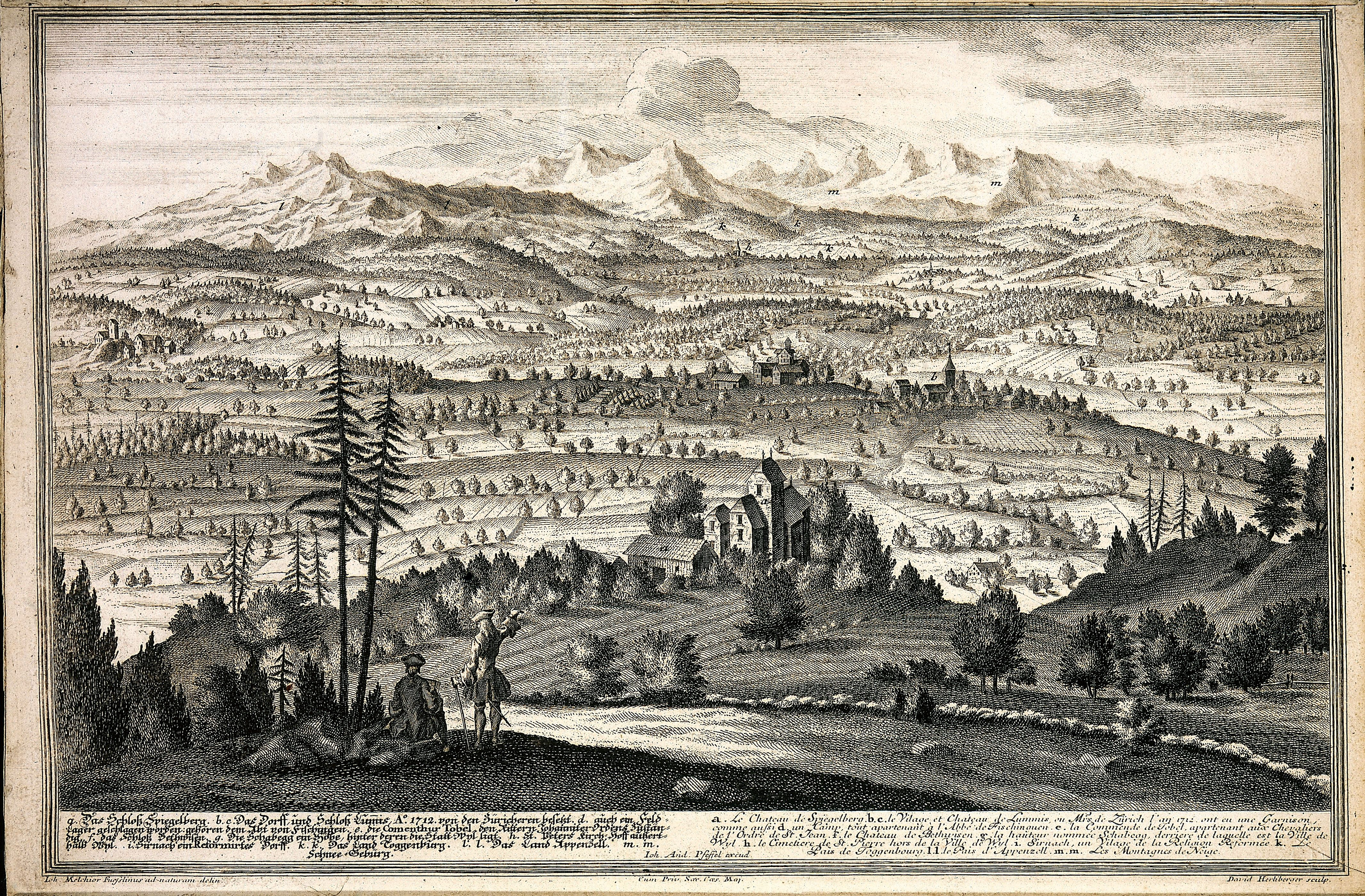 Kupferstich des Schloss Spiegelbergs bei Thundorf